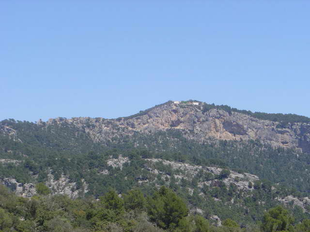 Castell d'Alaró. Alaró. Mallorca.